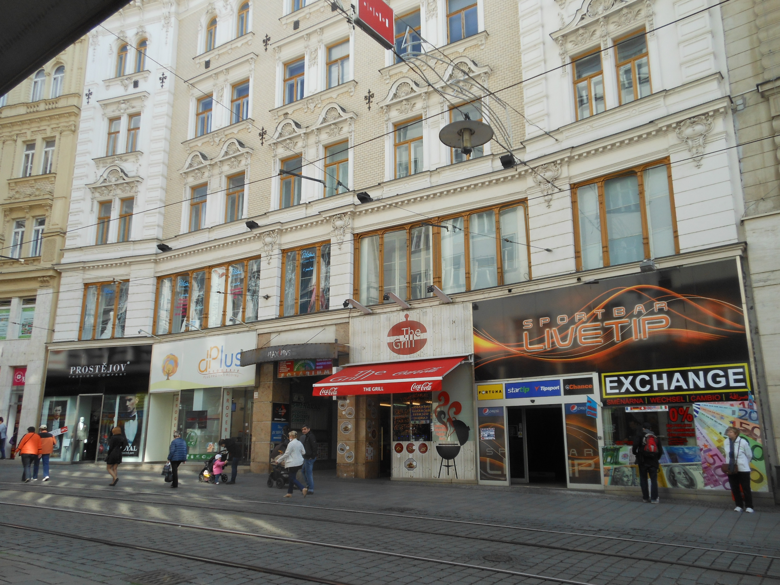 Parter historické budovy roztříštěný reklamou jednotlivých prodejců. Chodec přestává vnímat architekturu a dům jako celek. Masarykova 430/25, Brno, 2014.